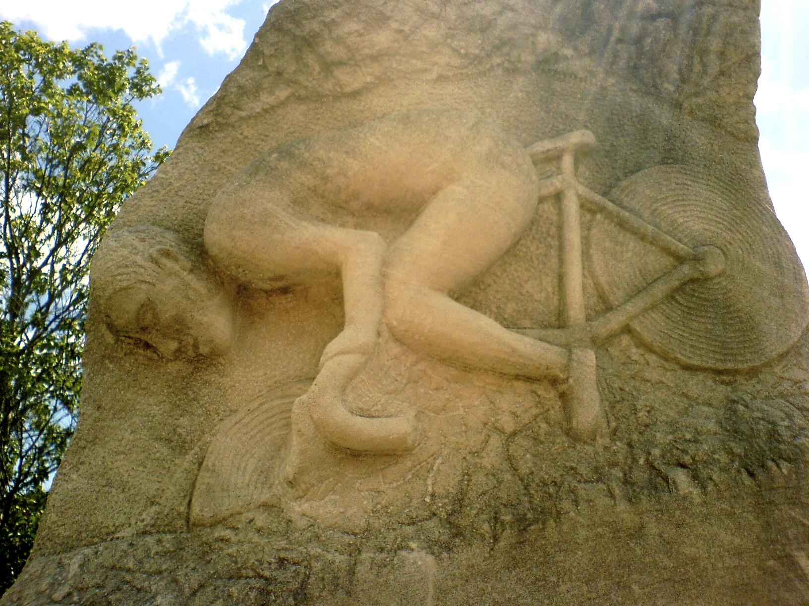 Het gedachtenismonument voor de val van Roger Rivière. Op de plaats van het ongeval, de afdaling van de Perjuret.